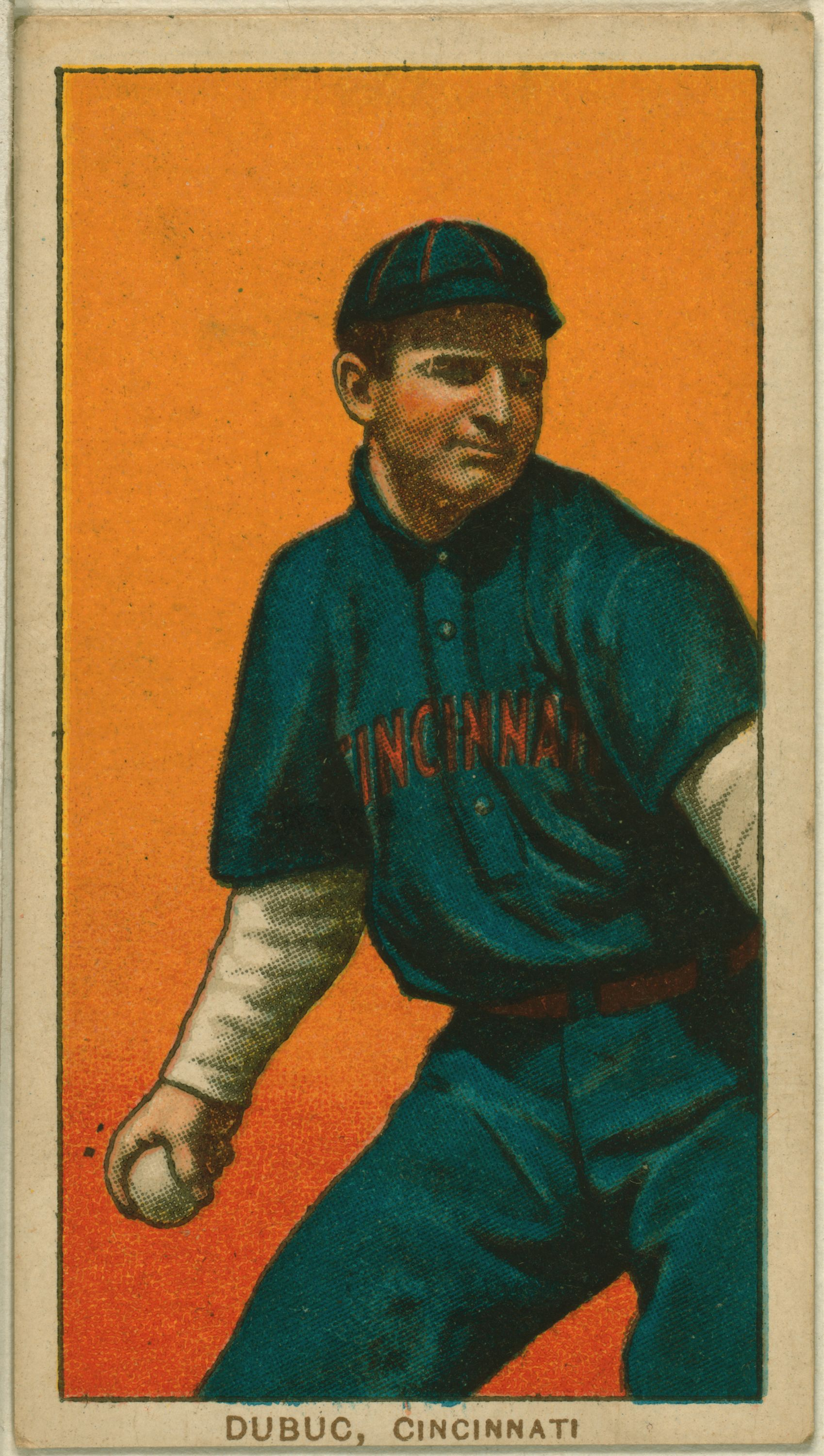 Jean Dubuc